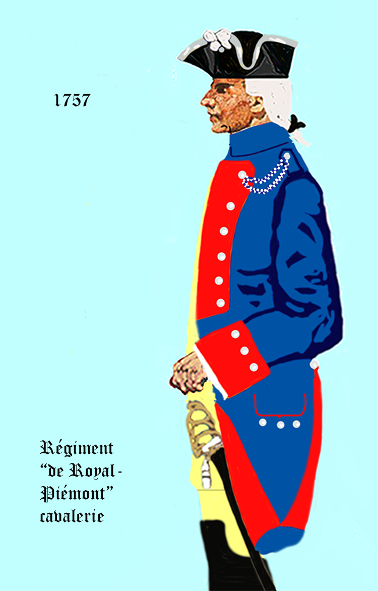 Uniform eines französischen Kavallerie-Regiments gemäß Verordnung von 1757